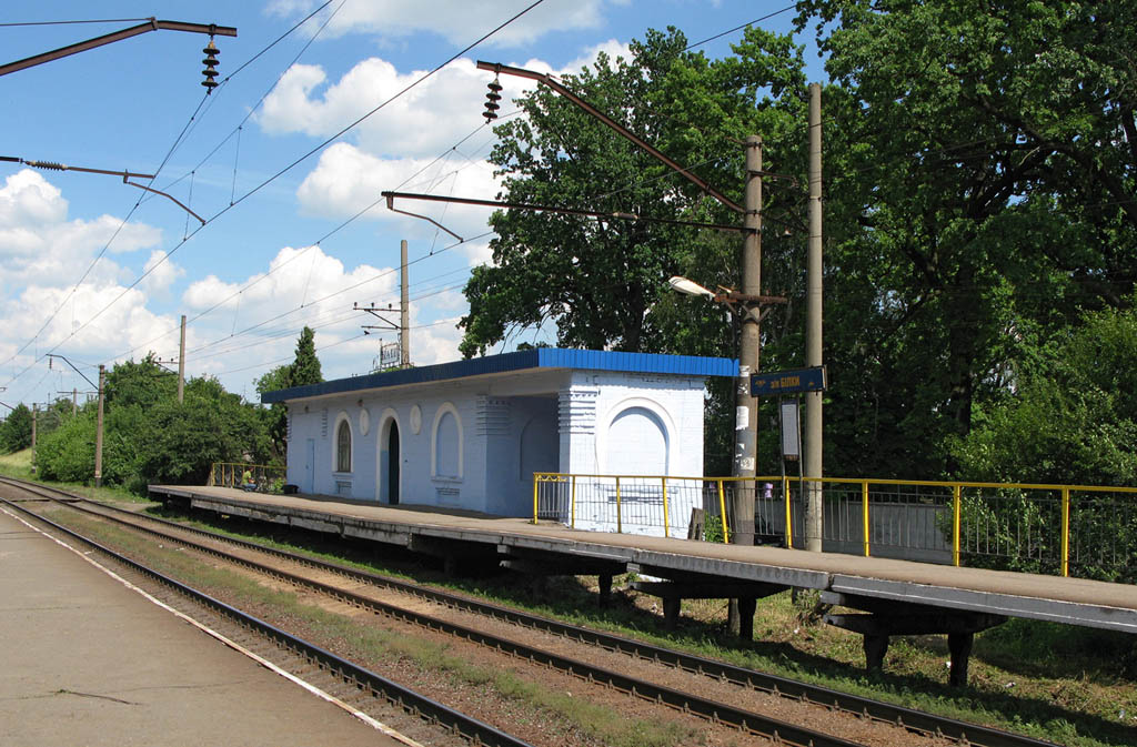 Пасажирський павільйон